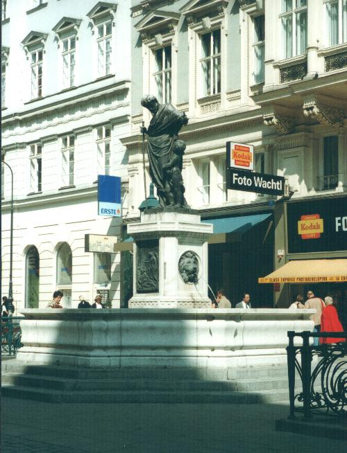 Grabenbrunnen